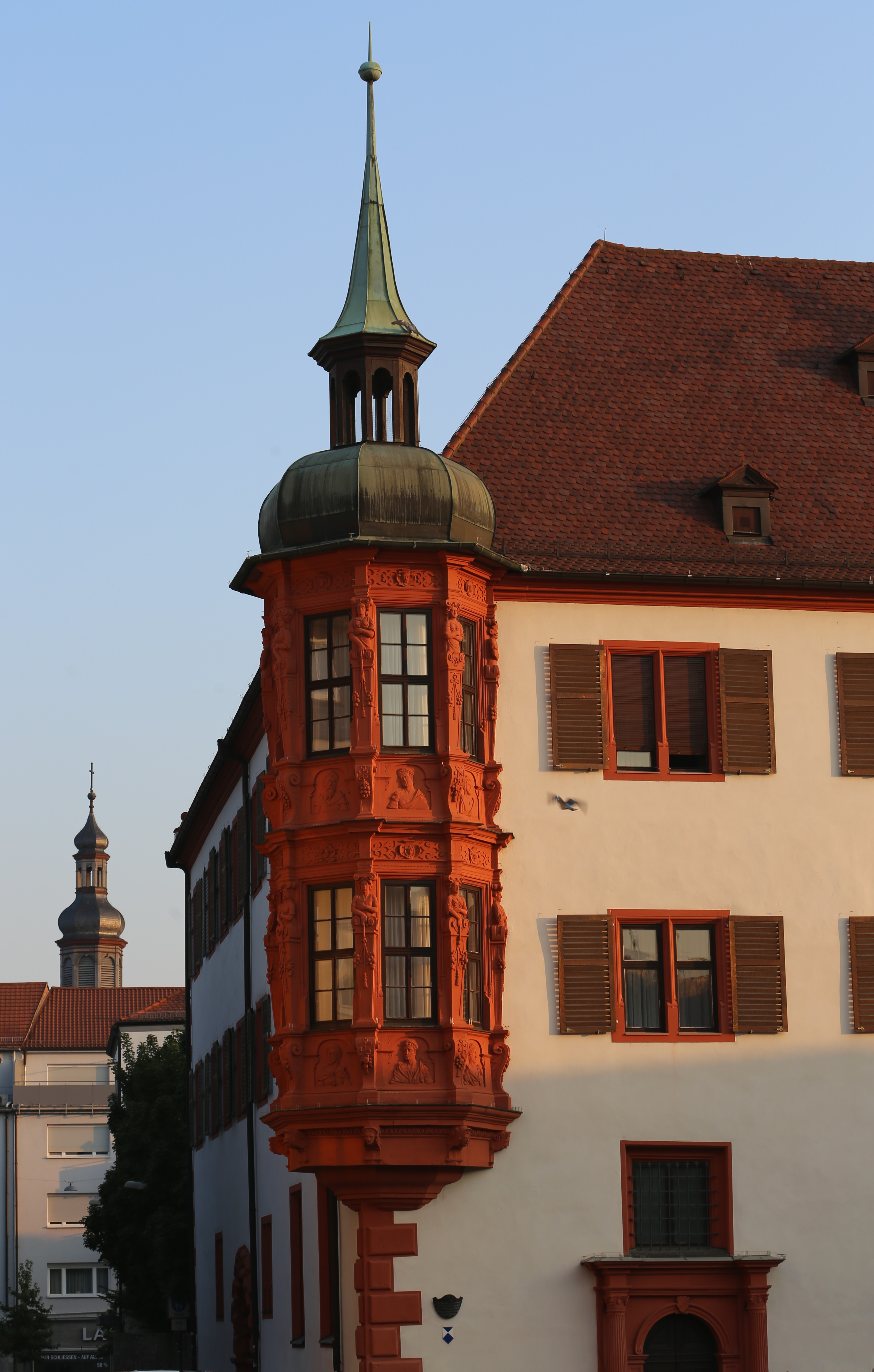 Kardinal-Döpfner-Platz 4, Würzburg; Ehemaliger Domherrnhof, Kurie Conti, jetzt Bischöfliches Palais, dreigeschossiger Zweiflügelbau mit Walmdach, Zwerchhaus mit Blendgiebel und zweigeschossiger Eckerker mit reicher Sandsteinornamentik, Spätrenaissance, 1588–1609, Wiederherstellung bis 1961